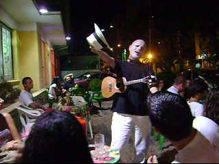 Cao Guimaraes, como Cantaí Cantador na Rua Gande em São Leopoldo 06/02/2010 Foto de Mary Oliveira